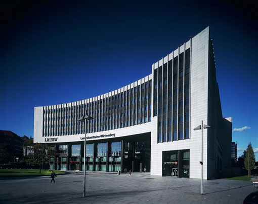 Hauptsitz der Landesbank Baden-Württemberg am Standort Stuttgart